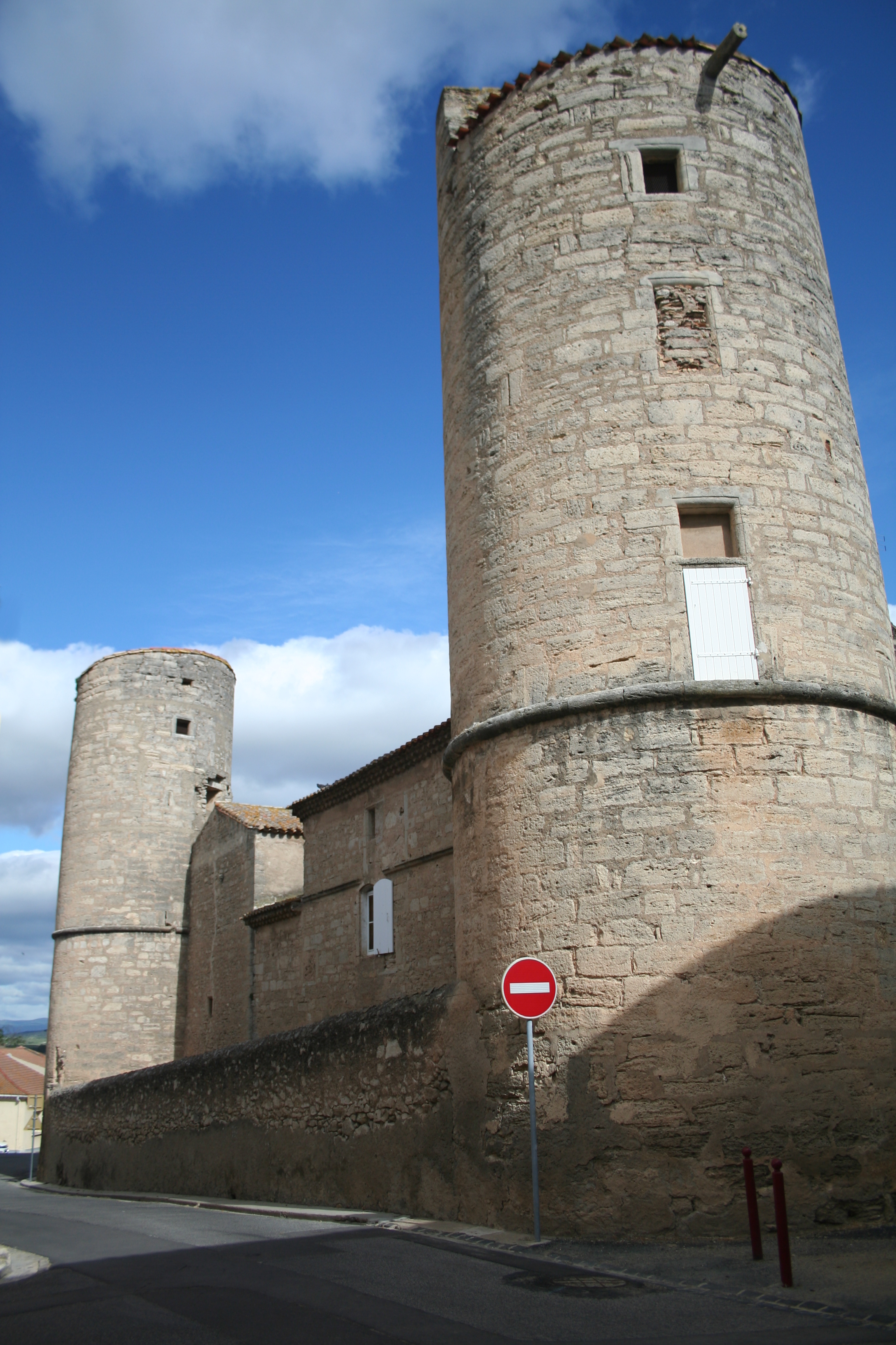 Maureilhan (Hérault) - château, façade sud.